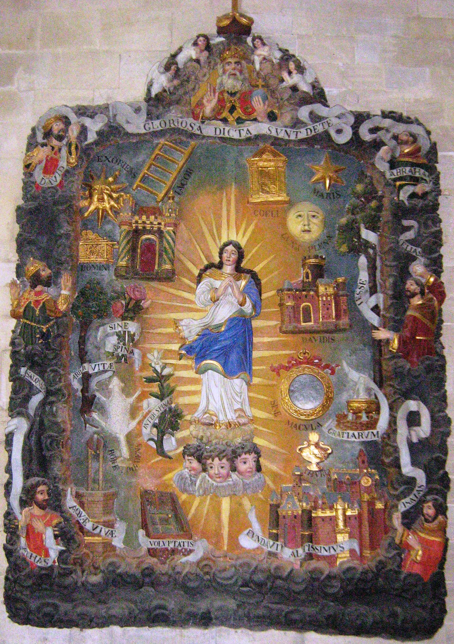 Mariendarstellung mit den Symbolen der Lauretanischen Litanei, XVII. Jahrhundert, Kathedrale in Bayeux (Frankreich)